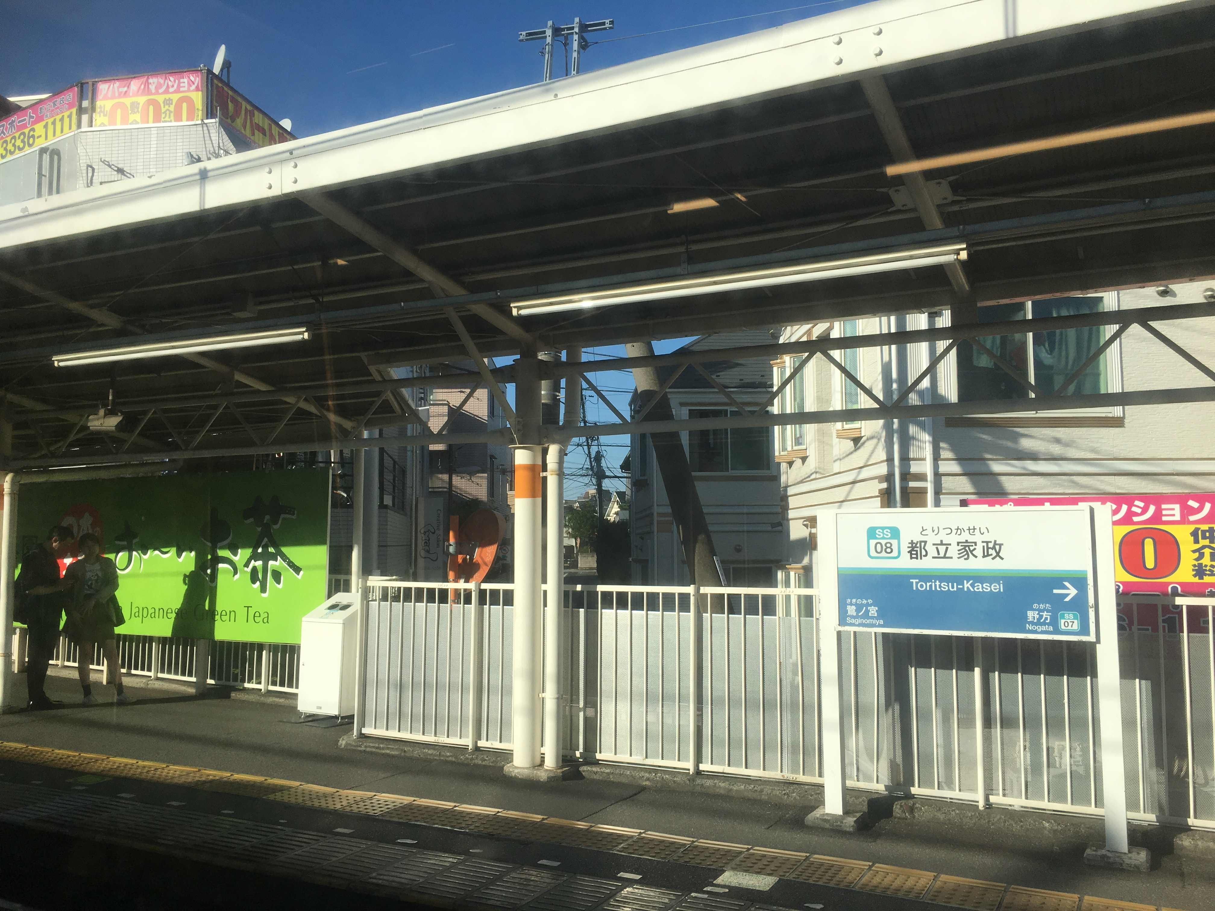 都立家政駅のホーム (Toritsu-Kasei Station platform)